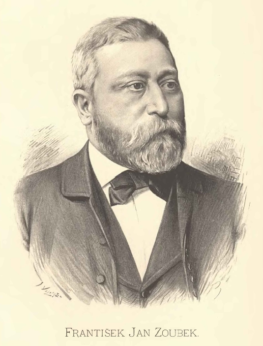 František Jan Zoubek (1832-1890), český středoškolský profesor a historik